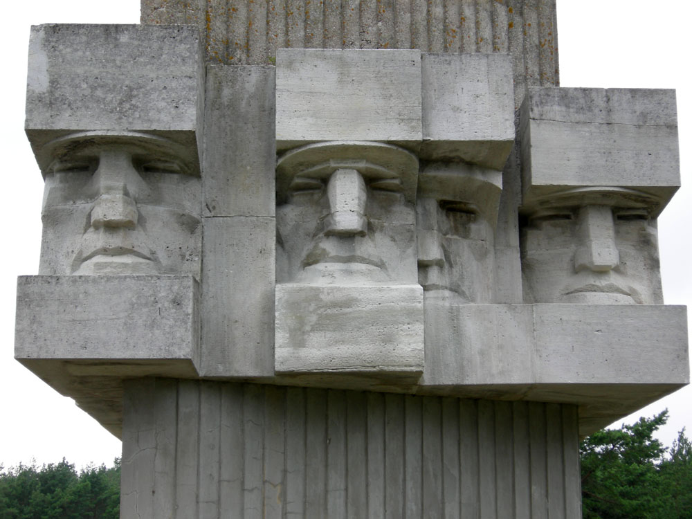 Soviet WWII memorial, Tehumardi, Saaremaa, Estonia. July 27, 2007.